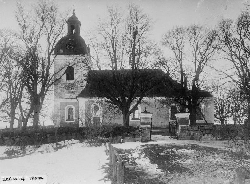 Kyrkan från söder. Skultuna kyrka byggdes på 1300-talet, som en rektangulär gråstenskyrka med höga gavlar, brant sadeltak och vapenhus i sydväst. Klockstapeln ersattes under 1700-talet av ett torn med kupolformad huv och åttkantig lanternin. Kategori: (01) ExteriörerKyrkan från söder. Skultuna kyrka byggdes på 1300-talet, som en rektangulär gråstenskyrka med höga gavlar, brant sadeltak och vapenhus i sydväst. Klockstapeln ersattes under 1700-talet av ett torn med kupolformad huv och åttkantig lanternin.